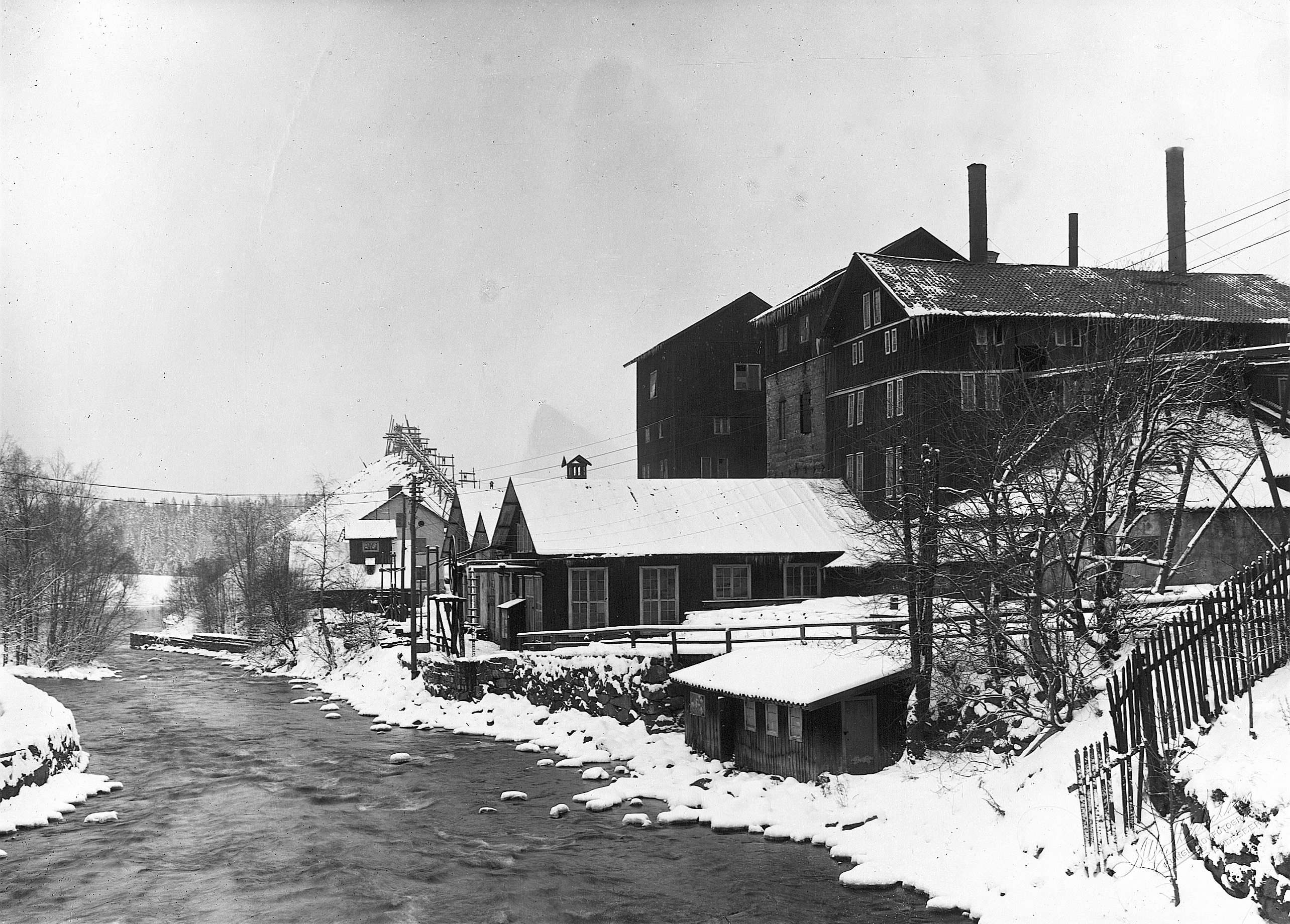 Dalkarlshyttan, exteriör.